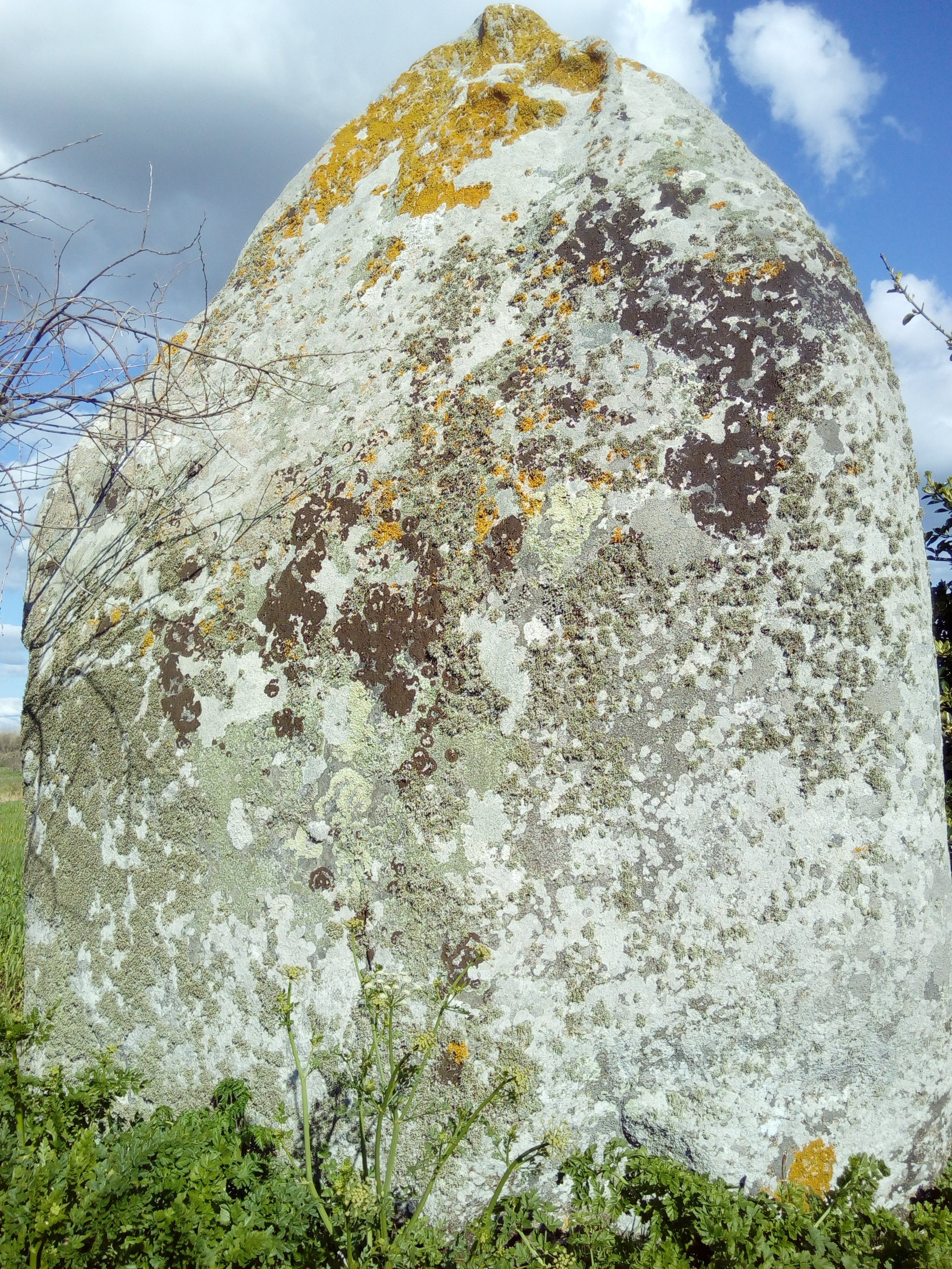 Face Ouest